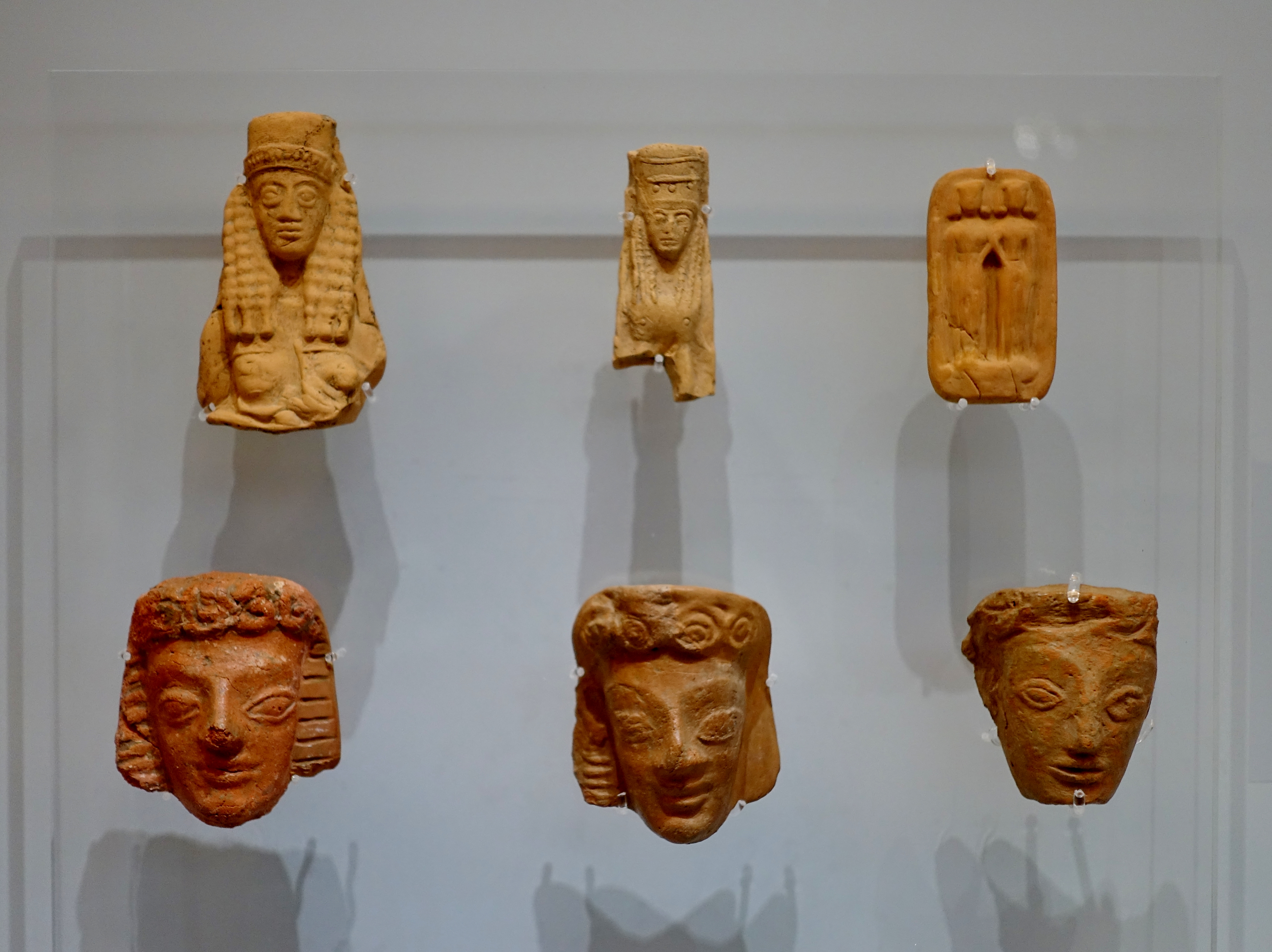 Figurinenköpfe, gefunden im Heiligtum des Hermes und der Aphrodite bei Symi, Archäologisches Museum von Iraklio, Kreta, Griechenland